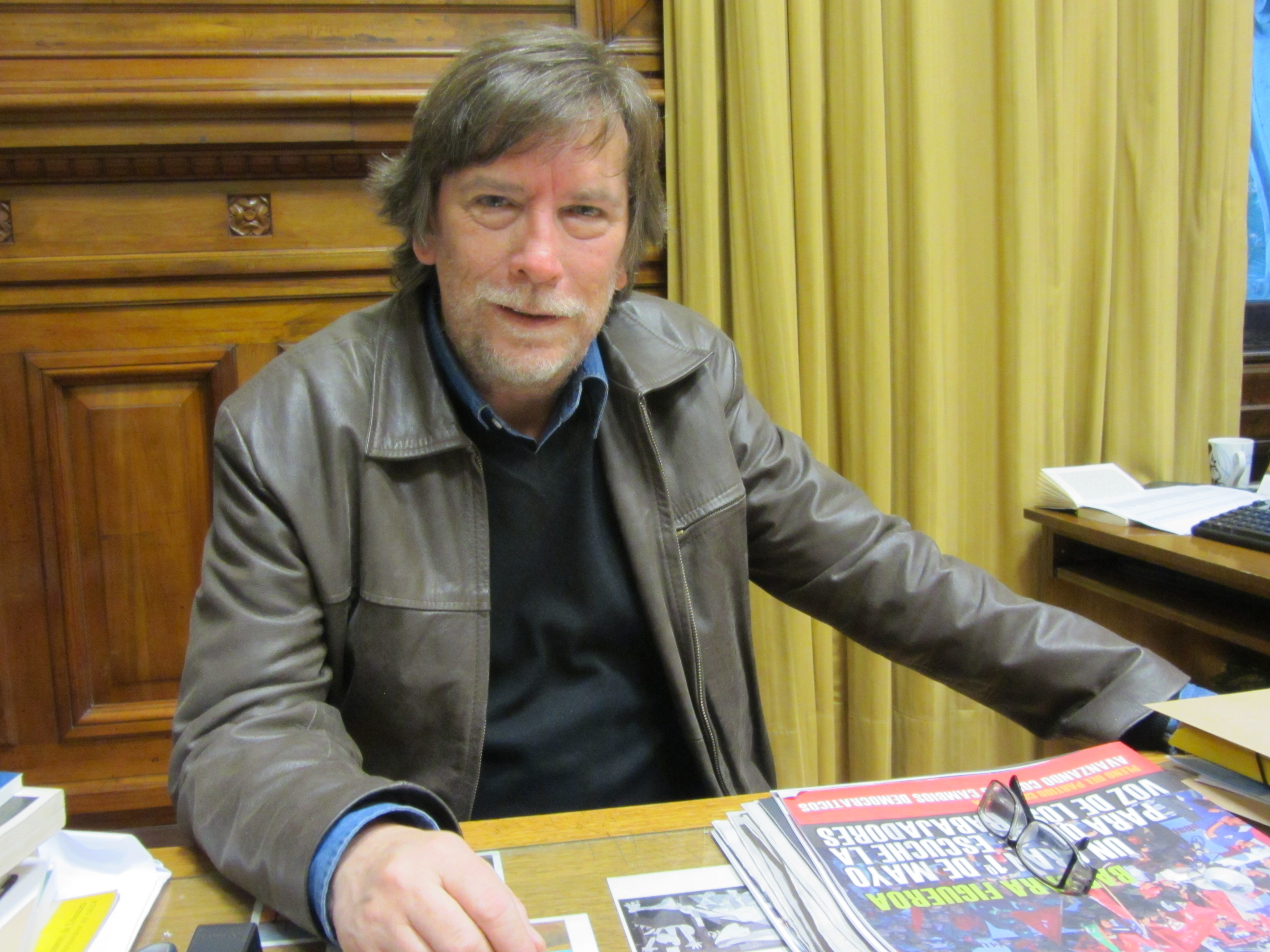 El poeta chileno Tomás Harris a su mesa de trabajo en el departamento de Referencias Críticas de la Biblioteca Nacional de Chile, mayo de 2014